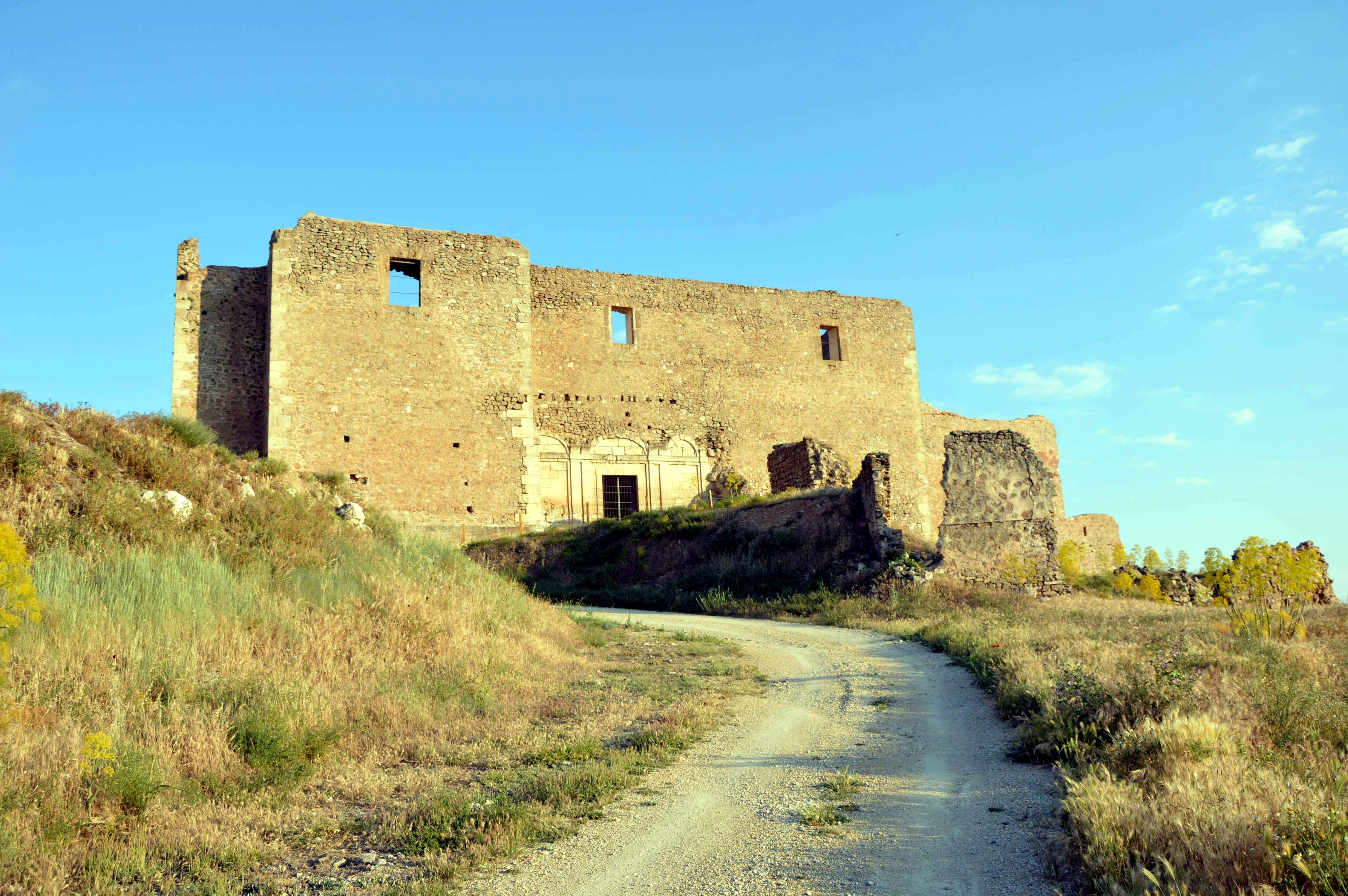 Vista septentrional del convento de las Concepcionistas -monjas de clausura de la Concepción Franciscana de Moya (Cuenca)-, siglo XVII (2017).